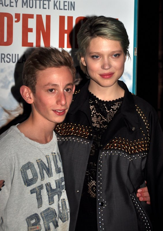 Kacey Mottet Klein et Léa Seydoux à l'avant-première de "L'Enfant d'en haut"